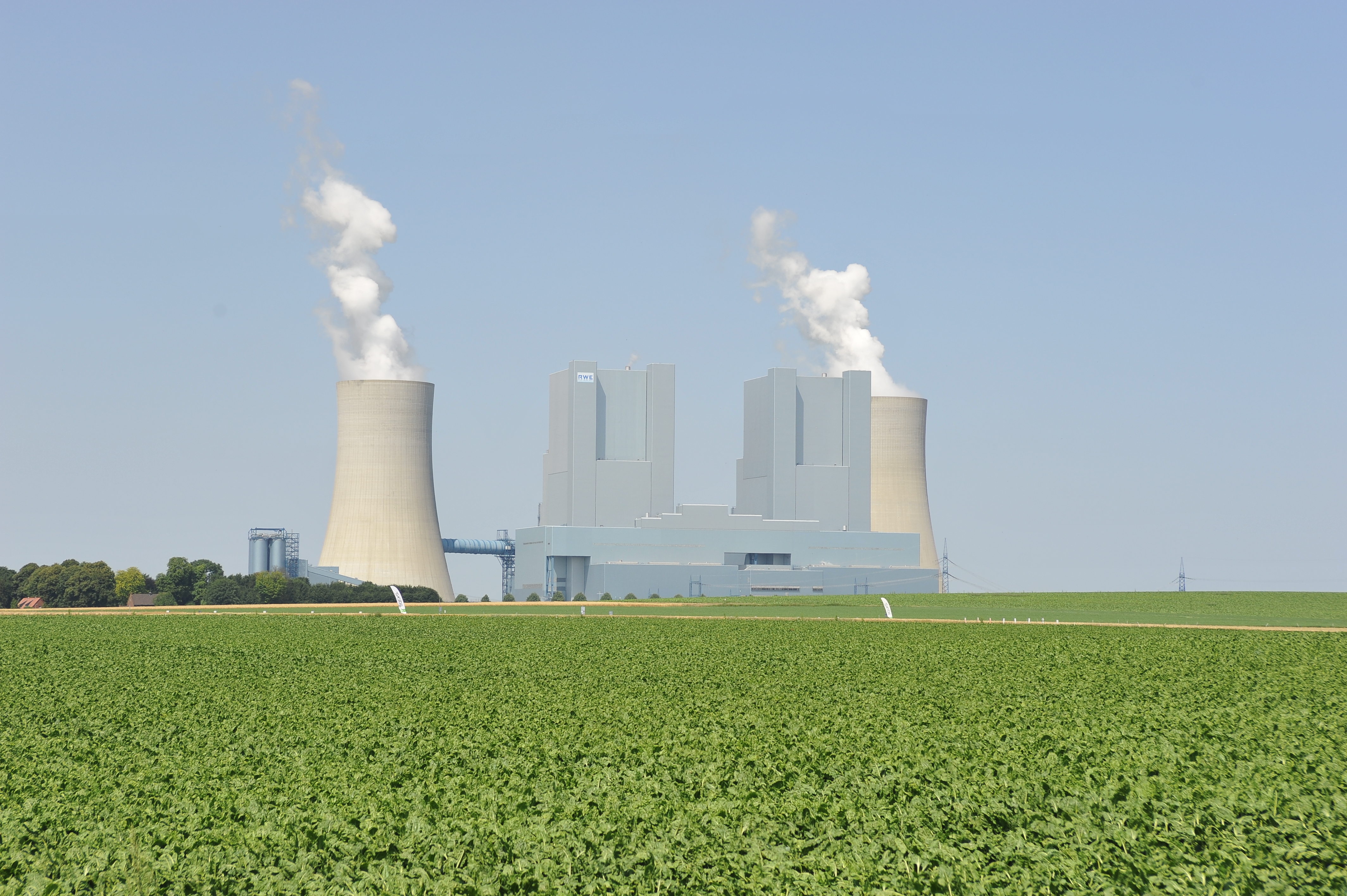 Kraftwerk Neurath Block F und G, Vorderansicht